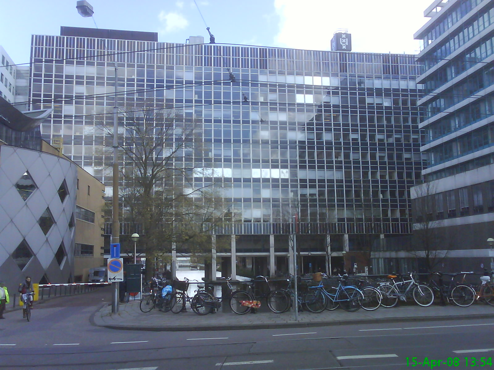 Voorzijde Universiteitscomplex "Roeterseiland" (N.J.J. Gawronski), Universiteit van Amsterdam